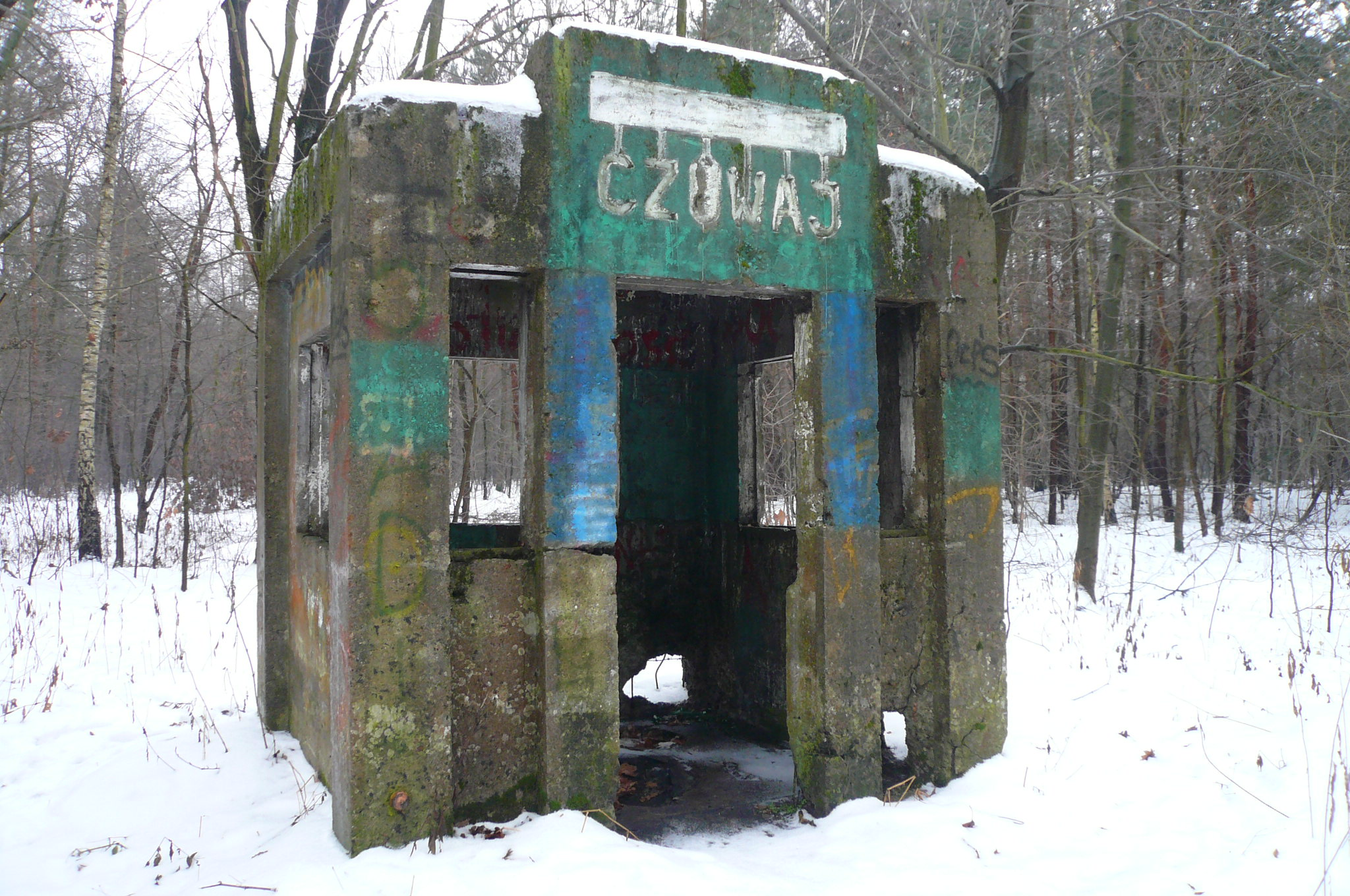 Pomalowana przez chuliganów budka strażnicza "czuwajka" w Lesie Bemowskim